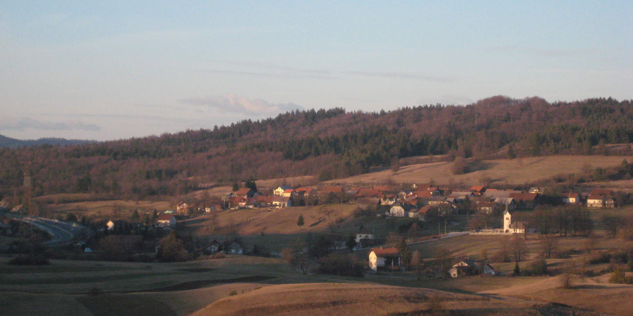 Ivanje Selo, village near Unec, Slovenia